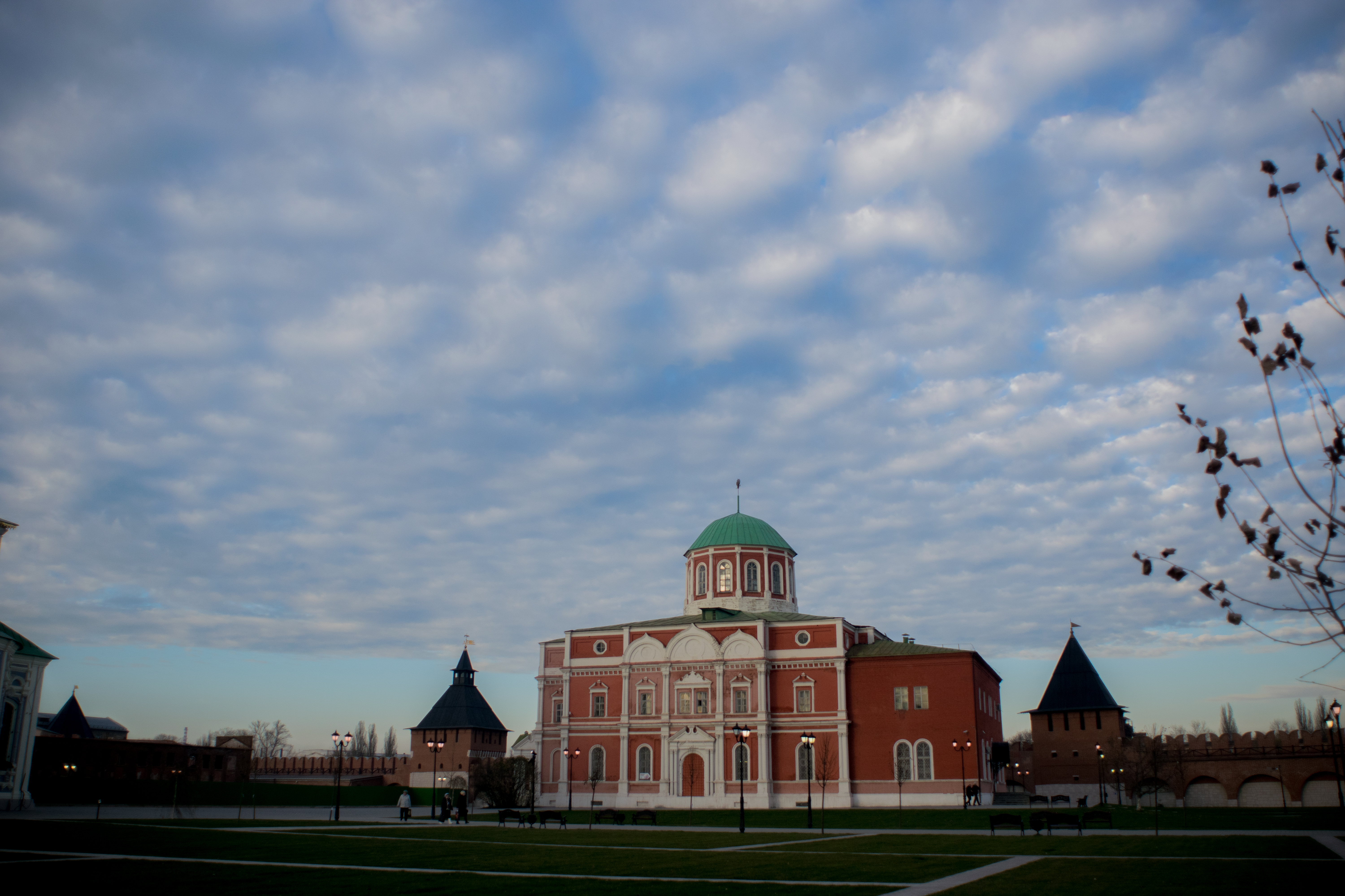 Собор Богоявленский (Тульская область, Тула, Кремль, (лит. Р, Р[i]))